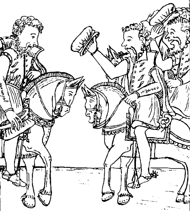 Dibujo de Guaman Poma de Ayala, que representa a Gonzalo Pizarro (al centro) recibiendo a Francisco de Carvajal] (a la derecha).